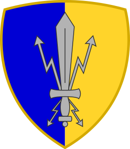 Scudetto della Brigata RISTA - EW.